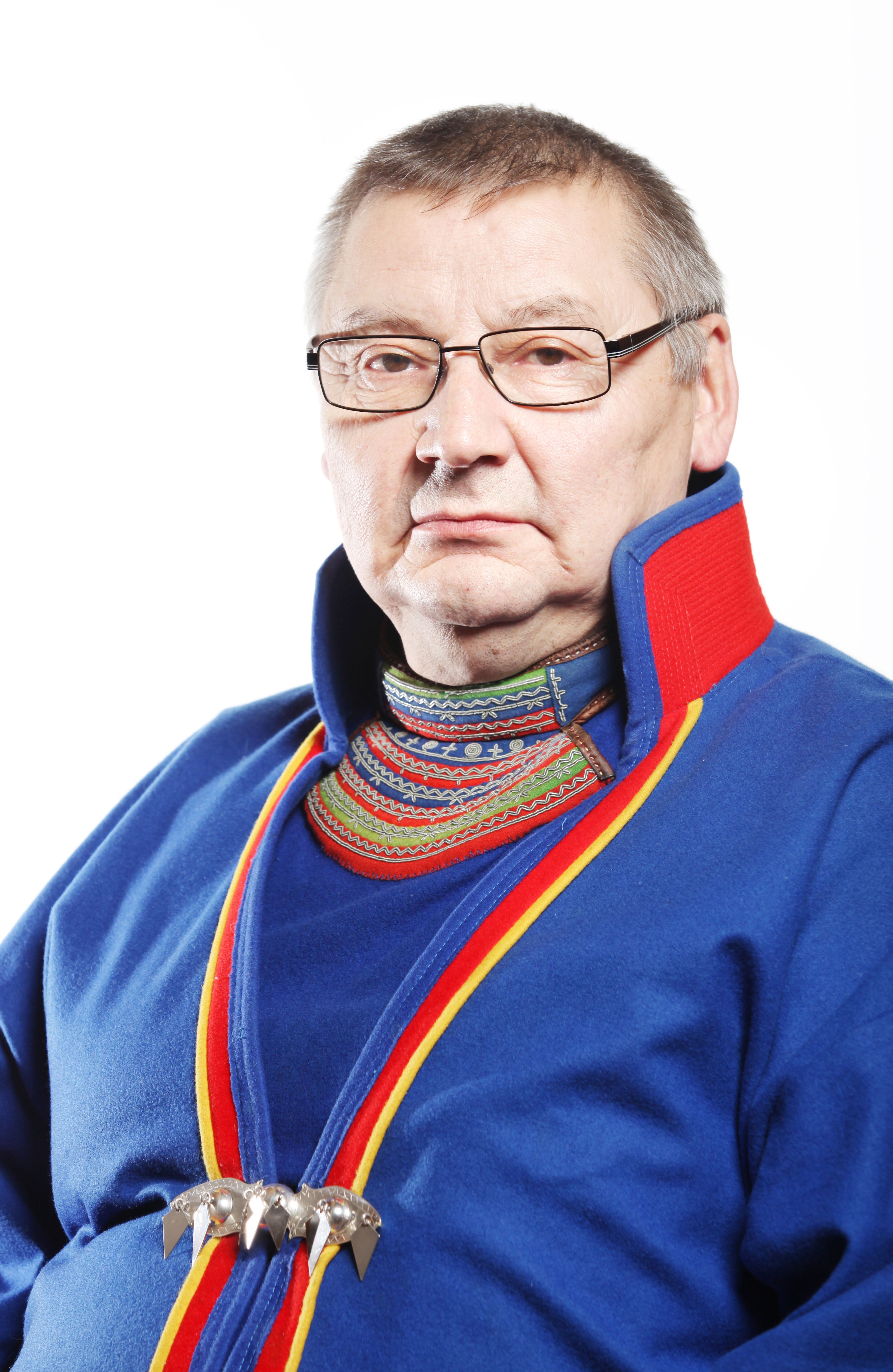 Leder av kontrollutvalget og medlem av oppvekst-, omsorg-, og utdanningskomitéen. Foto: Kenneth Hætta / Sametinget.